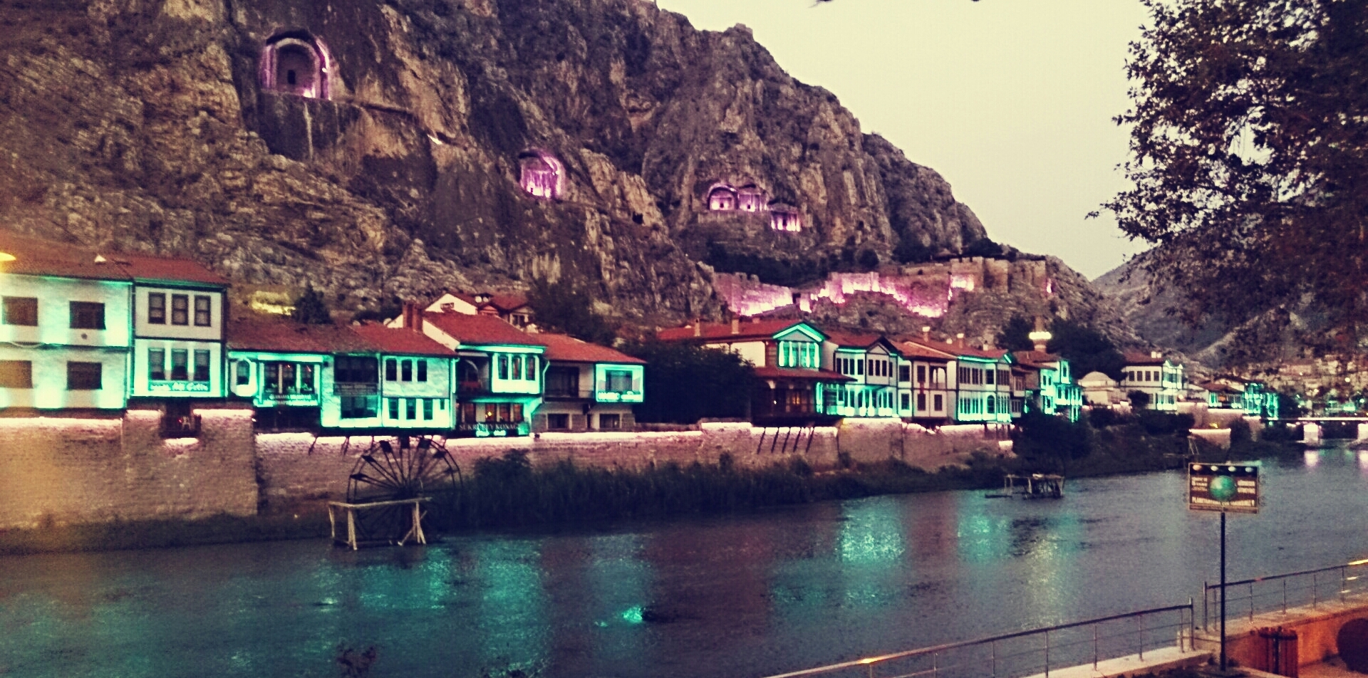 Akşam vaktinde yalı boyu evleri